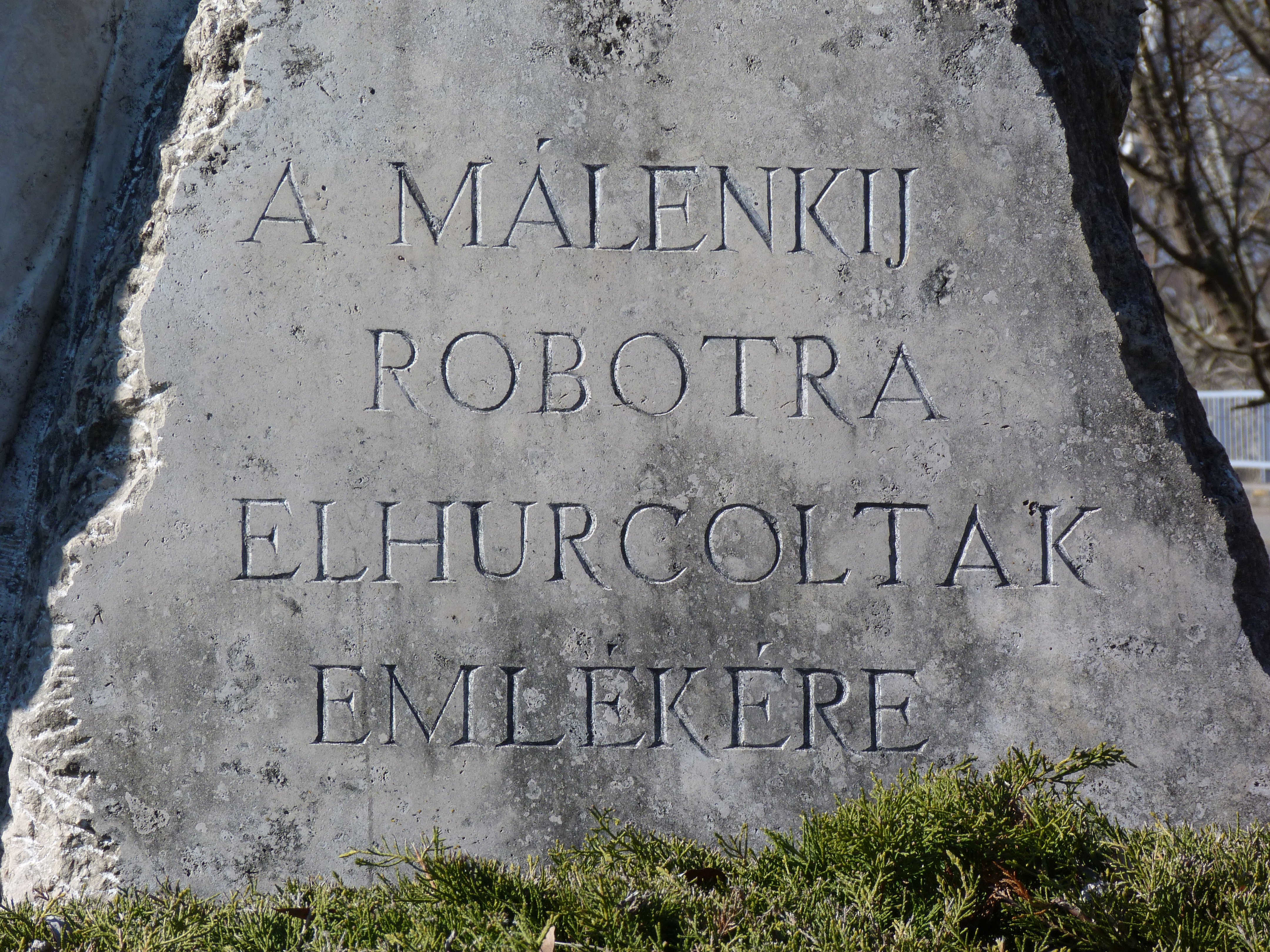 A felvételek 2013. Február 5 –én készültek Vásárosnaményben. Támási Áron emléklap, Művelődési Ház, Balázs József emléklapja, Malenkíj robotra elhurcoltak emlékműve, Kraszna. Tomcsányi kastély.